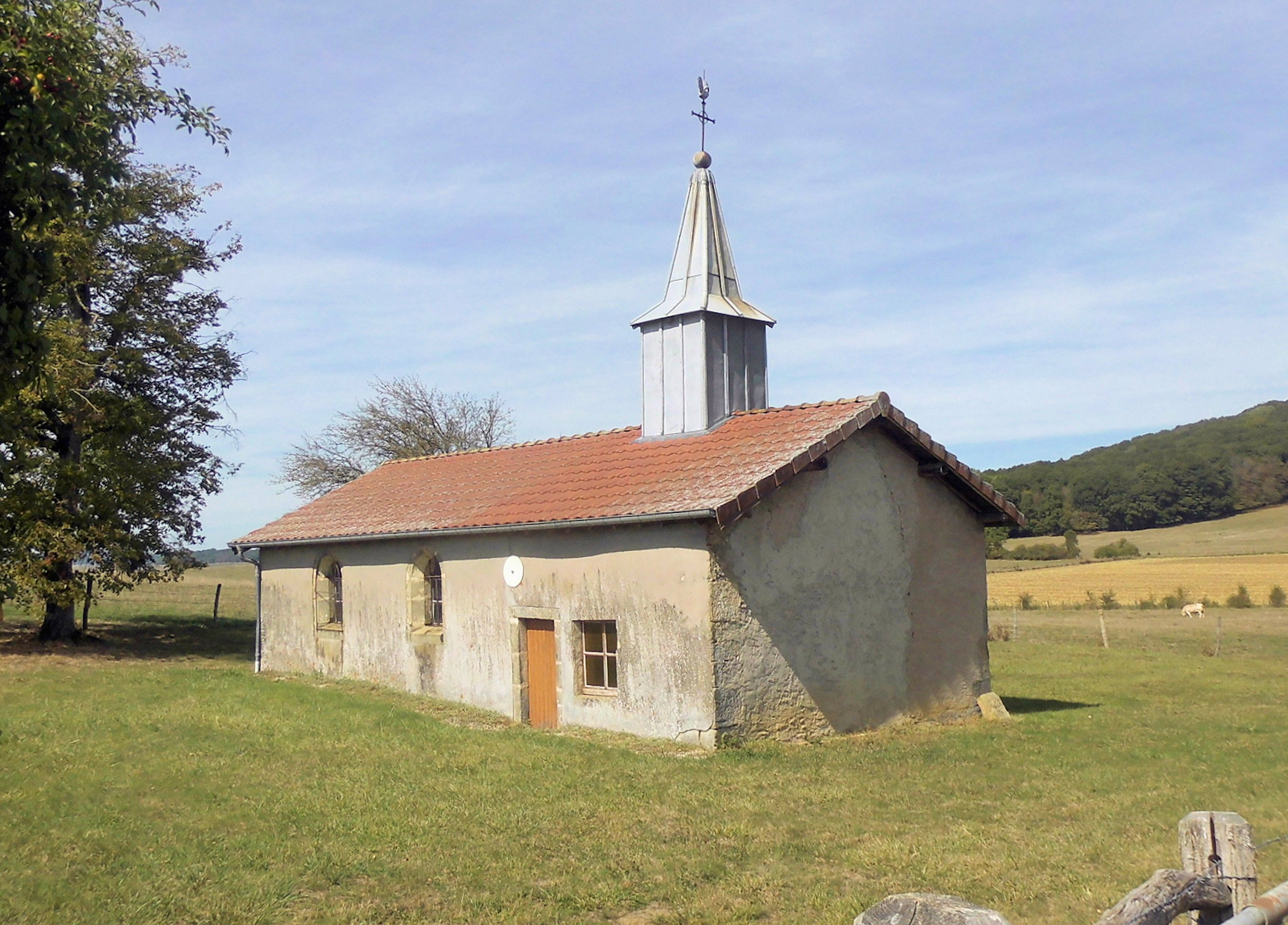 La chapelle Saint-Roch à Champigneulles-en-Bassigny